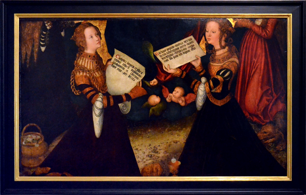 Pražský oltář Lucase Cranacha staršího: Sv. Kateřina a sv. Barbora (kolem r. 1520)